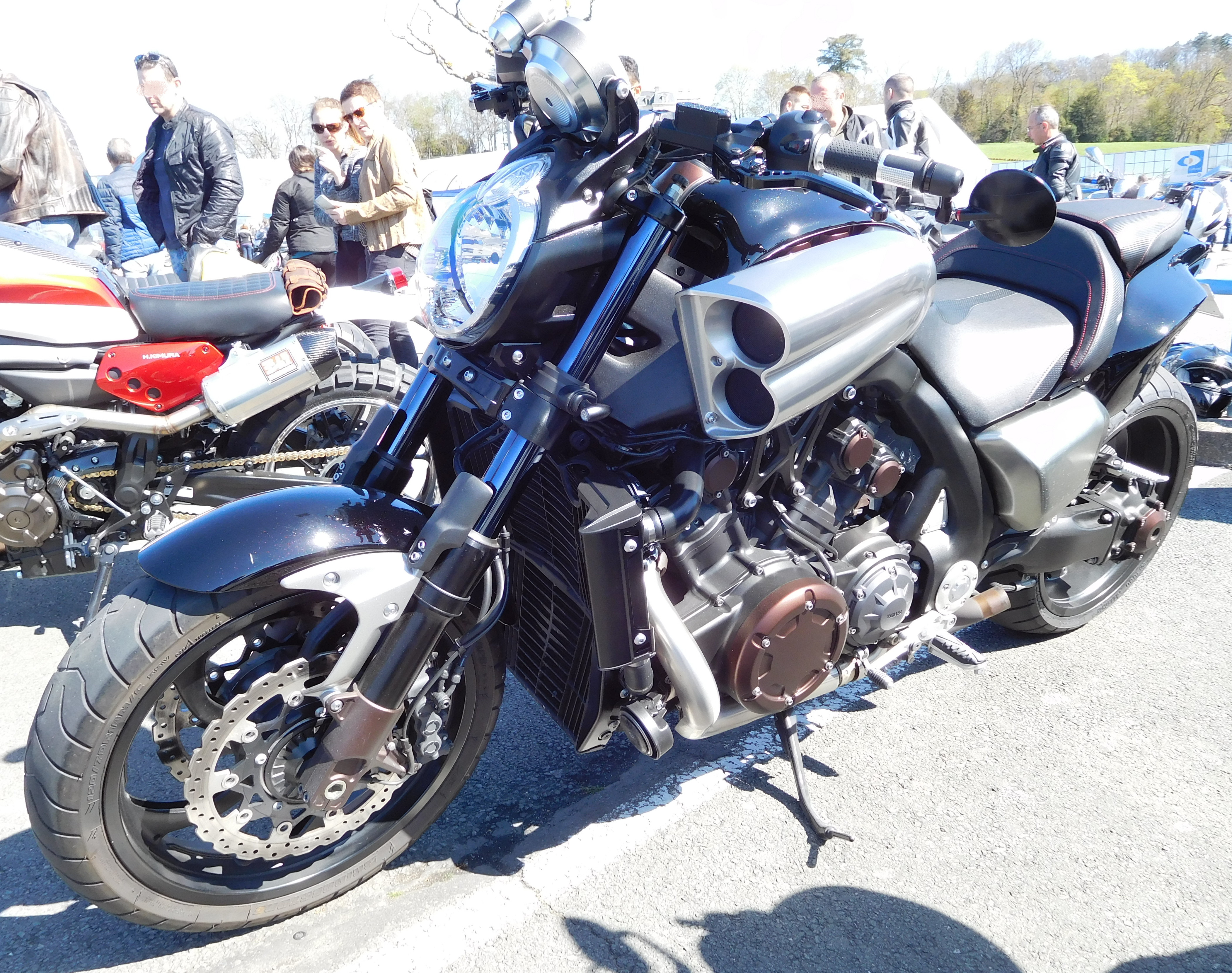 Yamaha 1700 VMax, au Rendez-vous des cabossés (France).